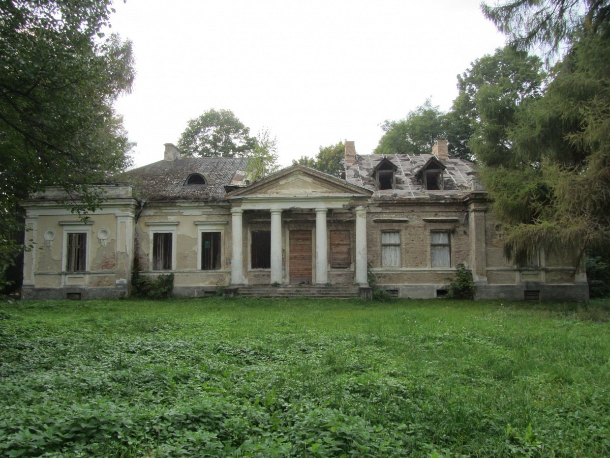 Грамяча. Сядзібна-паркавы ансамбль